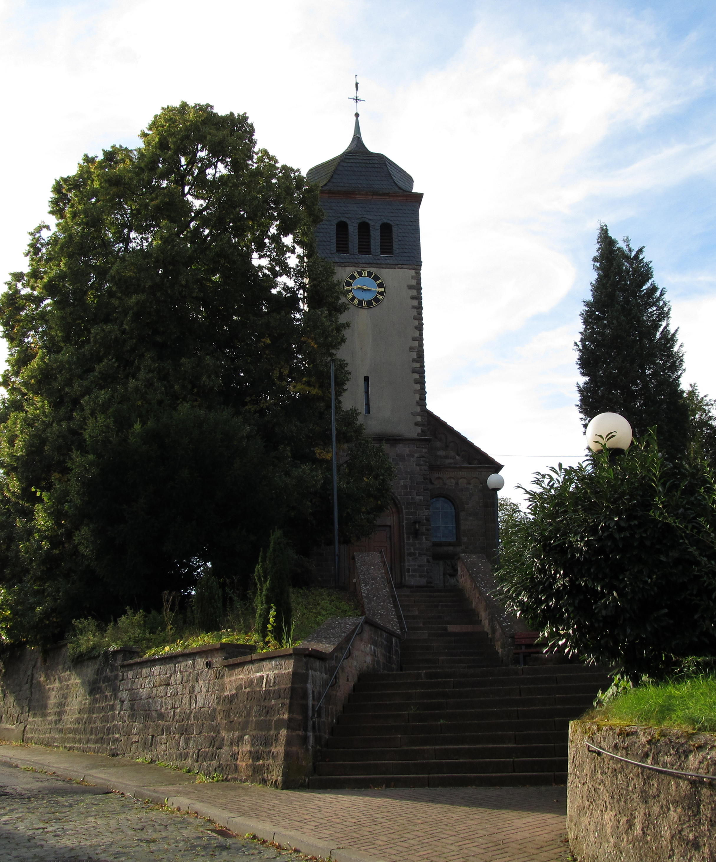 Die Protestantische Kirche in Höchen, einem Stadtteil von Bexbach, Saarland